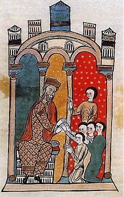 Les hommes de Perpignan jurent fidélité au roi Alphonse, le jour où il prend possession du comté de Roussillon, le 17 Juillet 1172